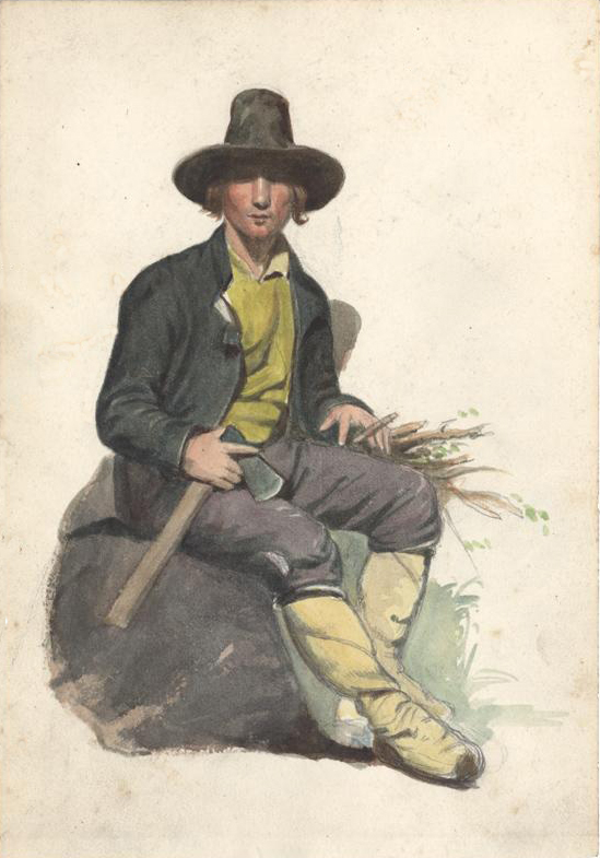 Auf einem Stein sitzender italienischer Arbeiter mit einem Beil in der rechten Hand